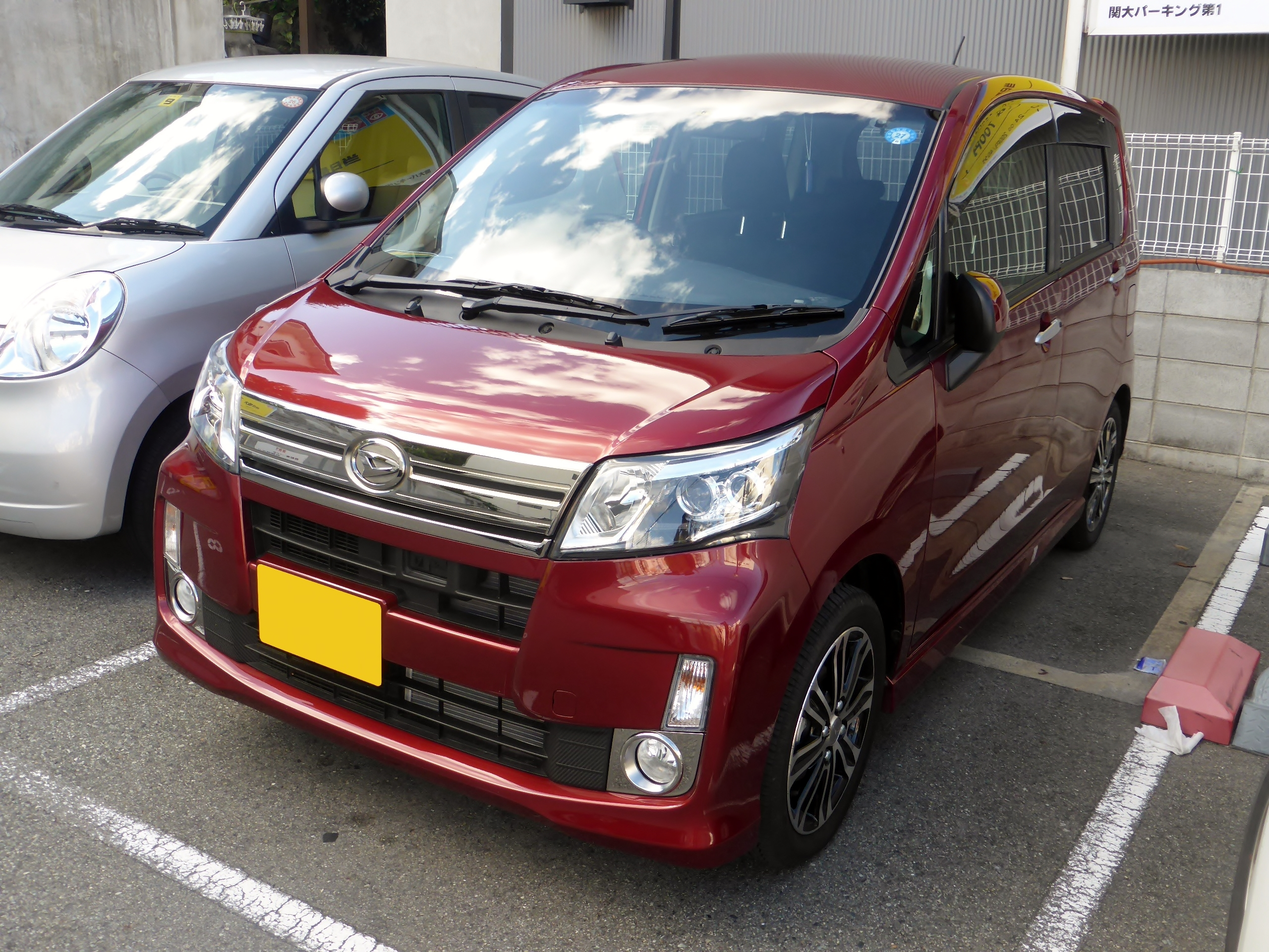 LA100S型ダイハツ・ムーヴカスタムX"VS"をフロントから撮影。